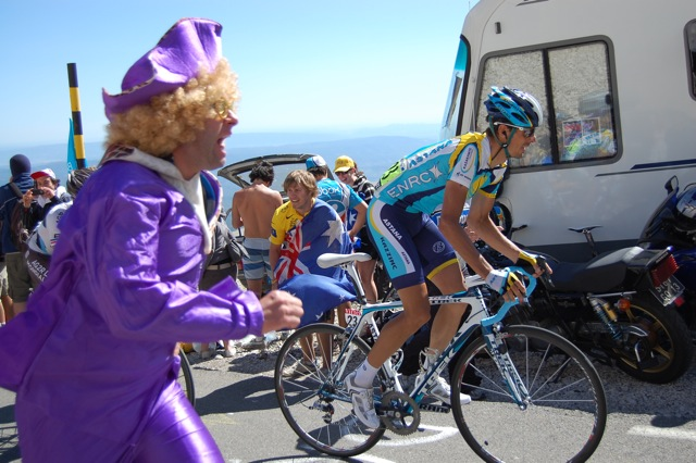 Andreas Klöden auf dem Weg zum Gipfel des Mont Ventoux, Tour de France 2009